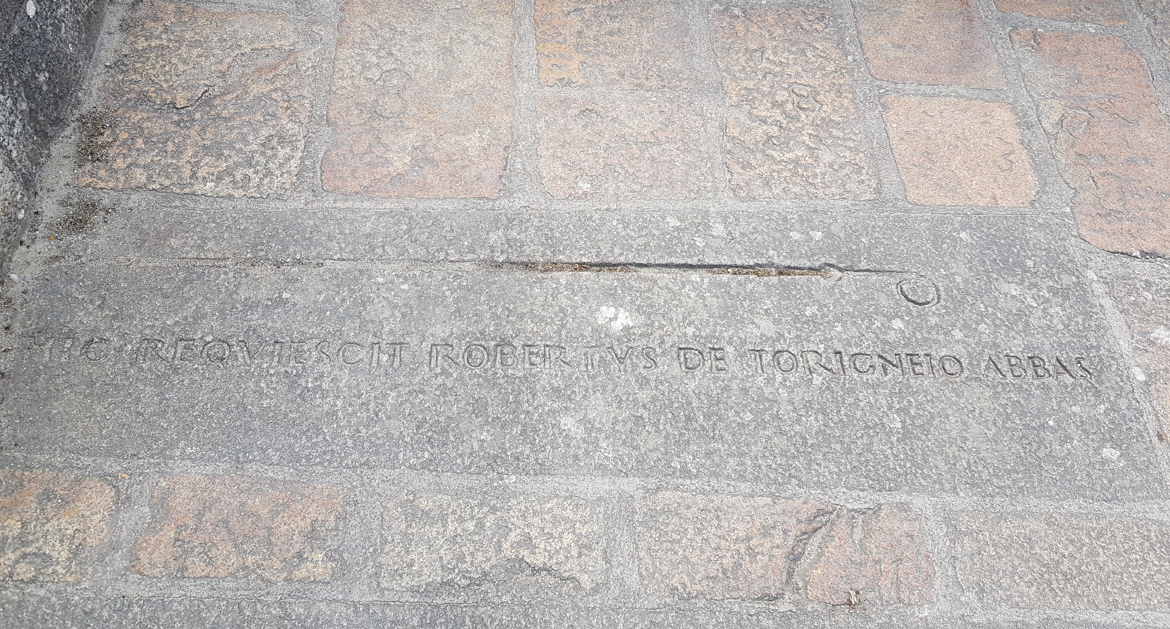 Pierre tombale de Robert de Torigni, abbé du Mont-Saint-Michel de 1154 à 1186 (abbaye du Mont-Saint-Michel, terrasse ouest, devant l'église abbatiale).